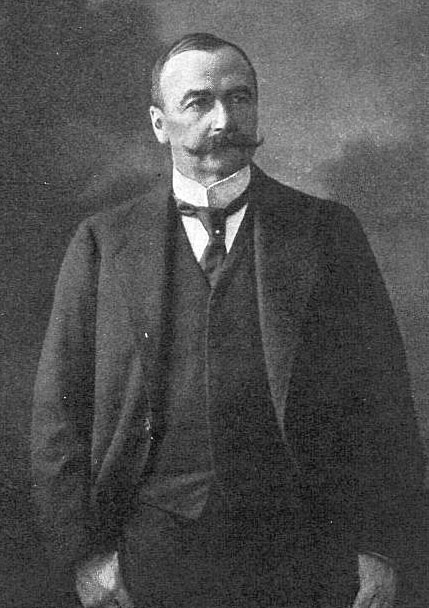 Aleksander MeysztowiczLietuvių: Aleksander Meysztowicz Мейсштович Александр Эдуардович